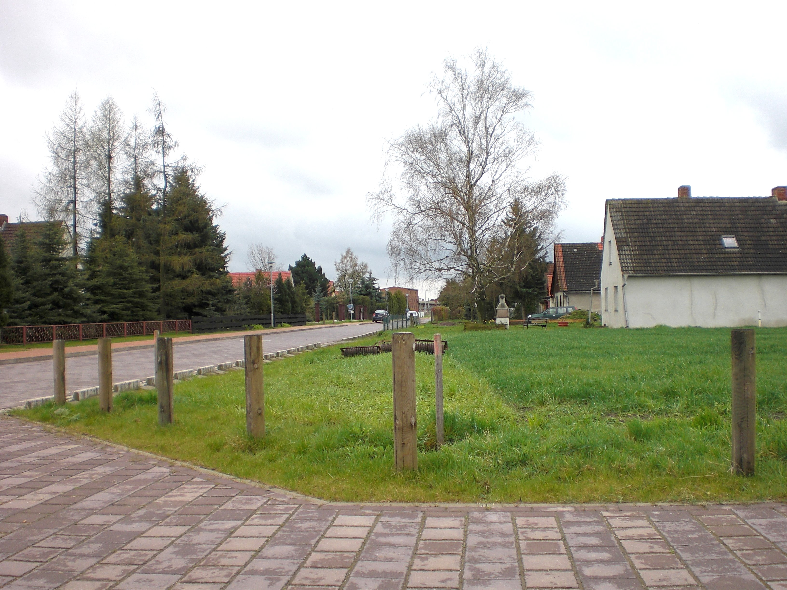 nördliche Siedlung in Andersleben